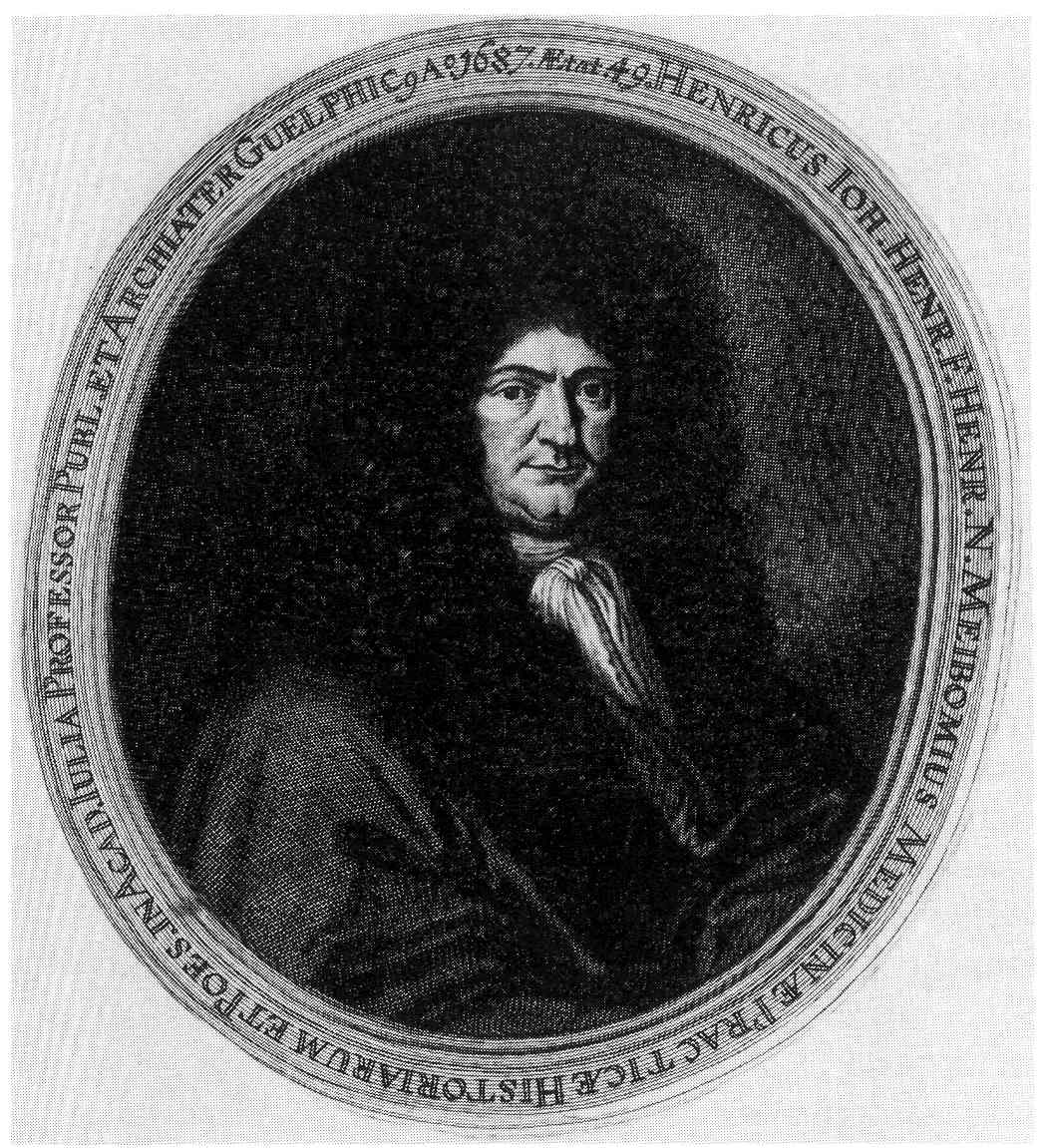 Johann Heinrich Meibom der Jüngere (1638–1700), Professor an der Universität Helmstedt.